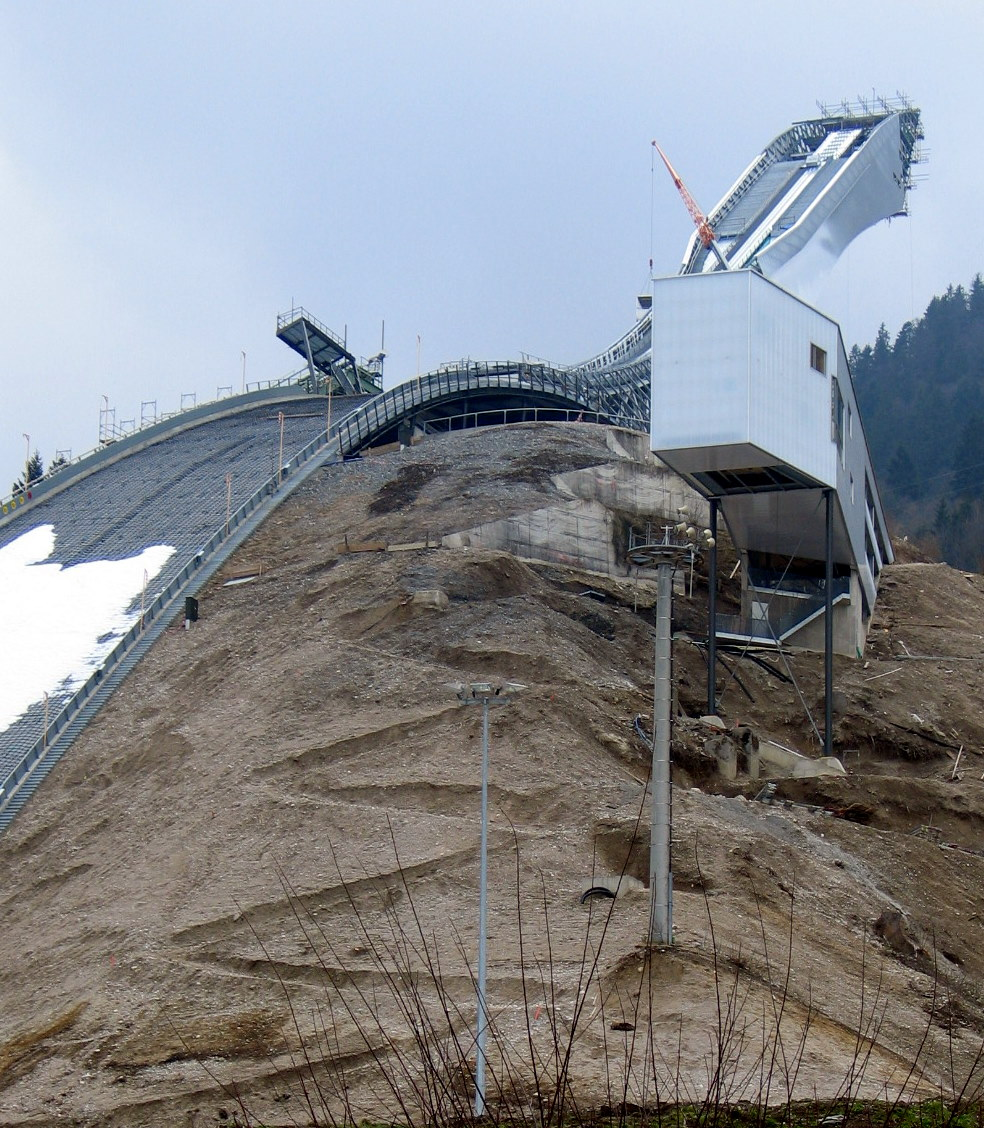 de nieuwe Olympiaschans in Garmisch-Partenkirchen